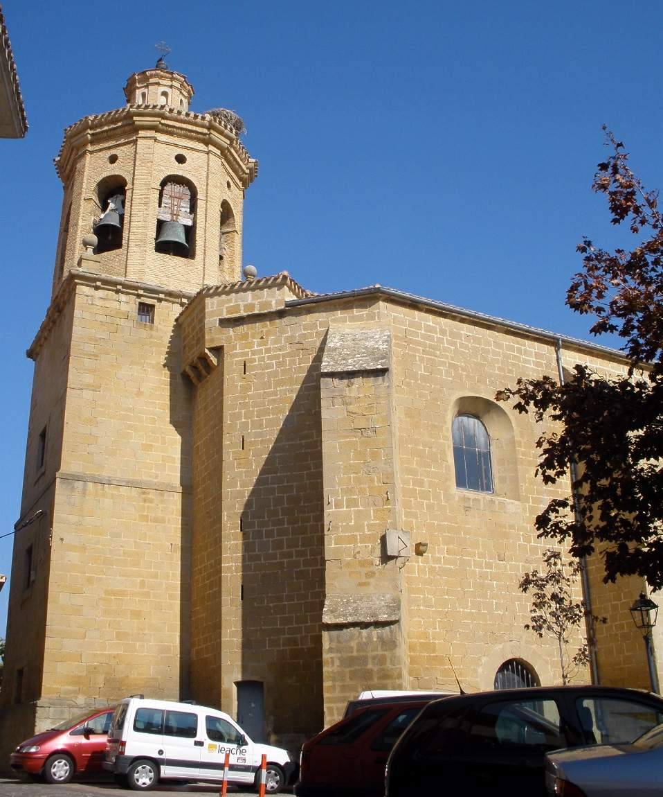 Church of San Pedro, Tafalla